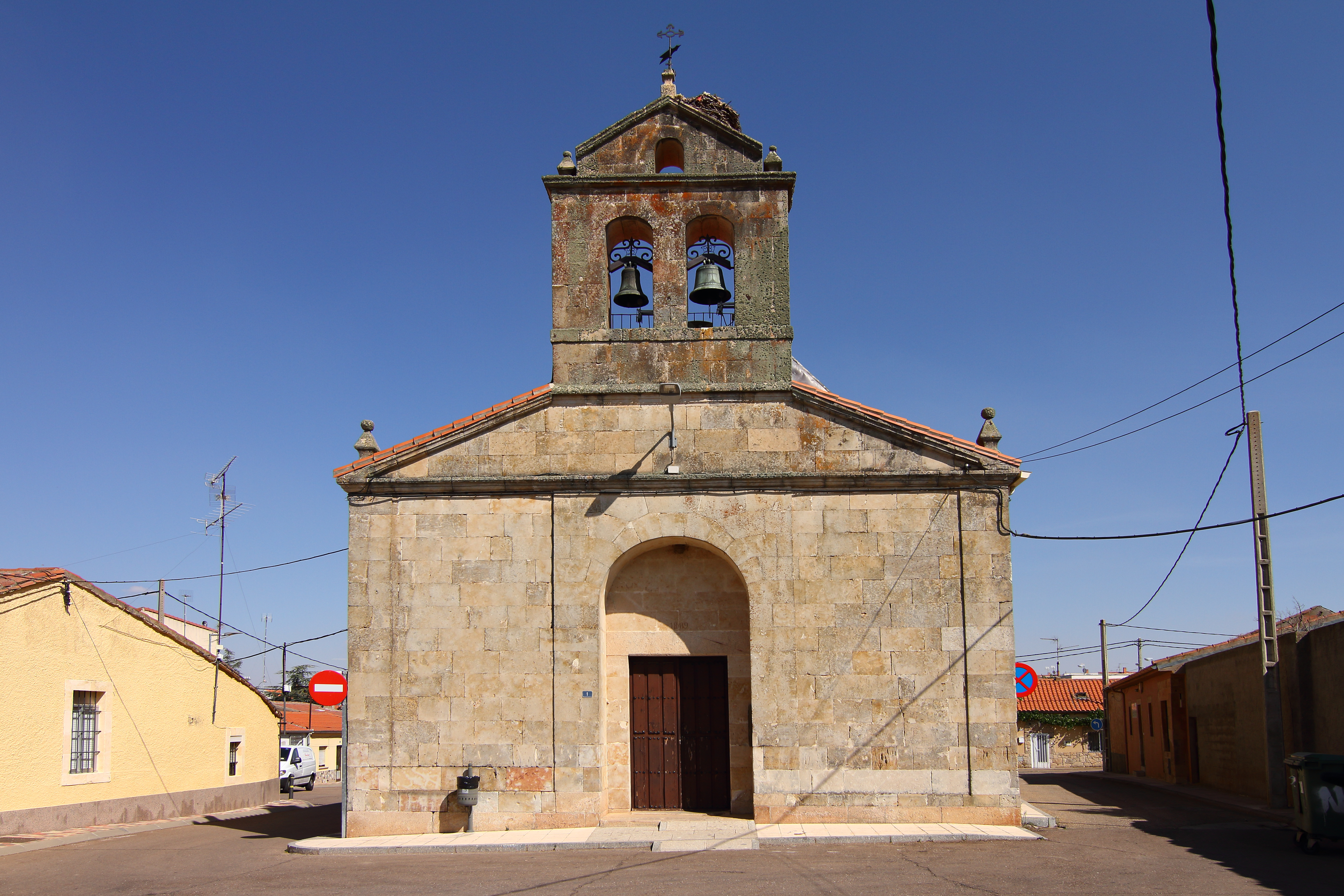 Iglesia parroquial de Doñinos de Salamanca